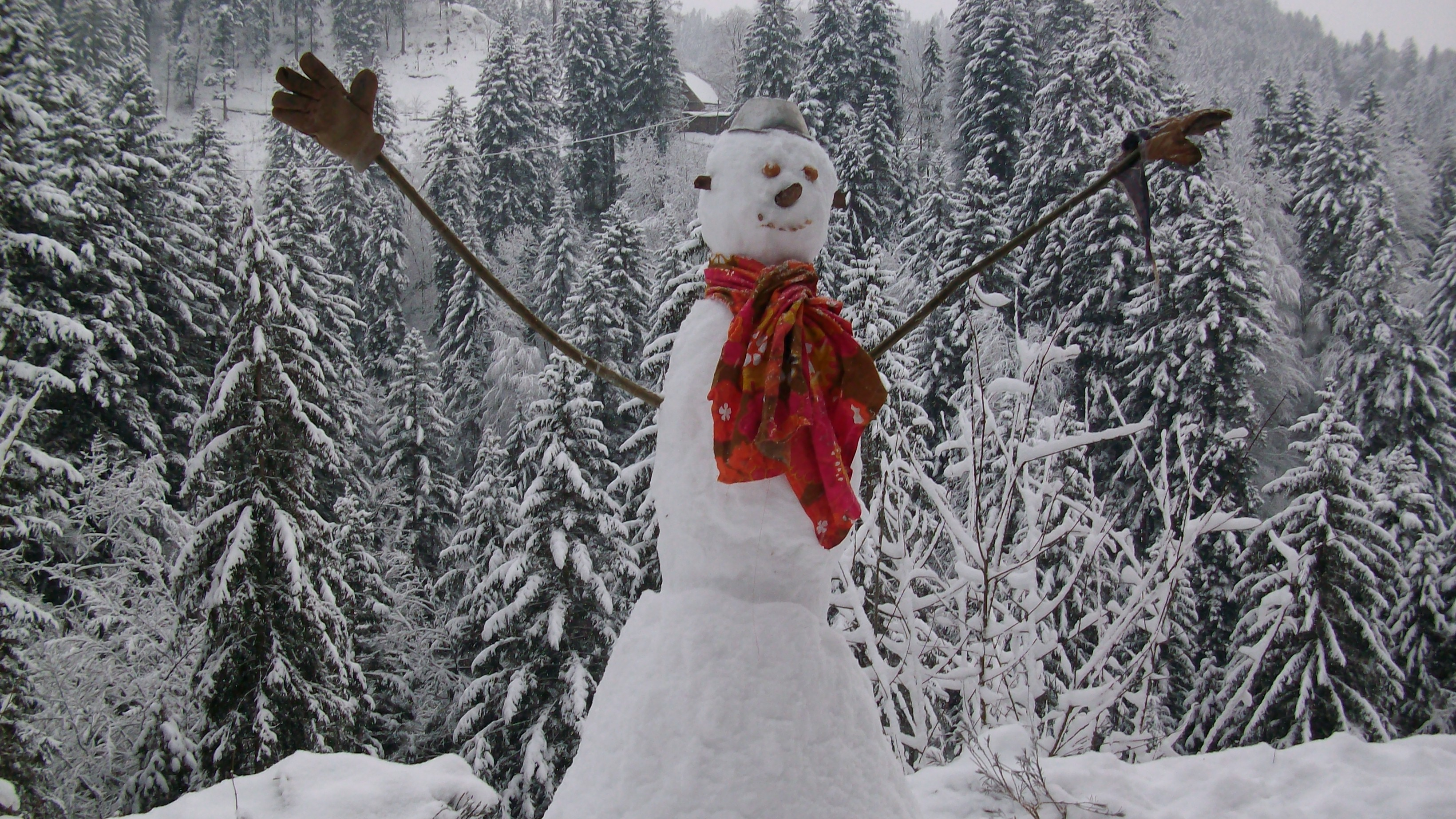 Schneemann aus dem Emmental